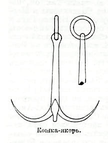 Якорь-кошка. Эта фотография была использована для иллюстрирования статьи «Кошка» опубликованной в тринадцатом томе «Военной энциклопедии», который был издан книгоиздательским товариществом И. Д. Сытина в 1913 году в столице Российской империи городе Санкт-Петербурге. Более подробное описание к этой картинке можно прочесть в указанной выше статье.